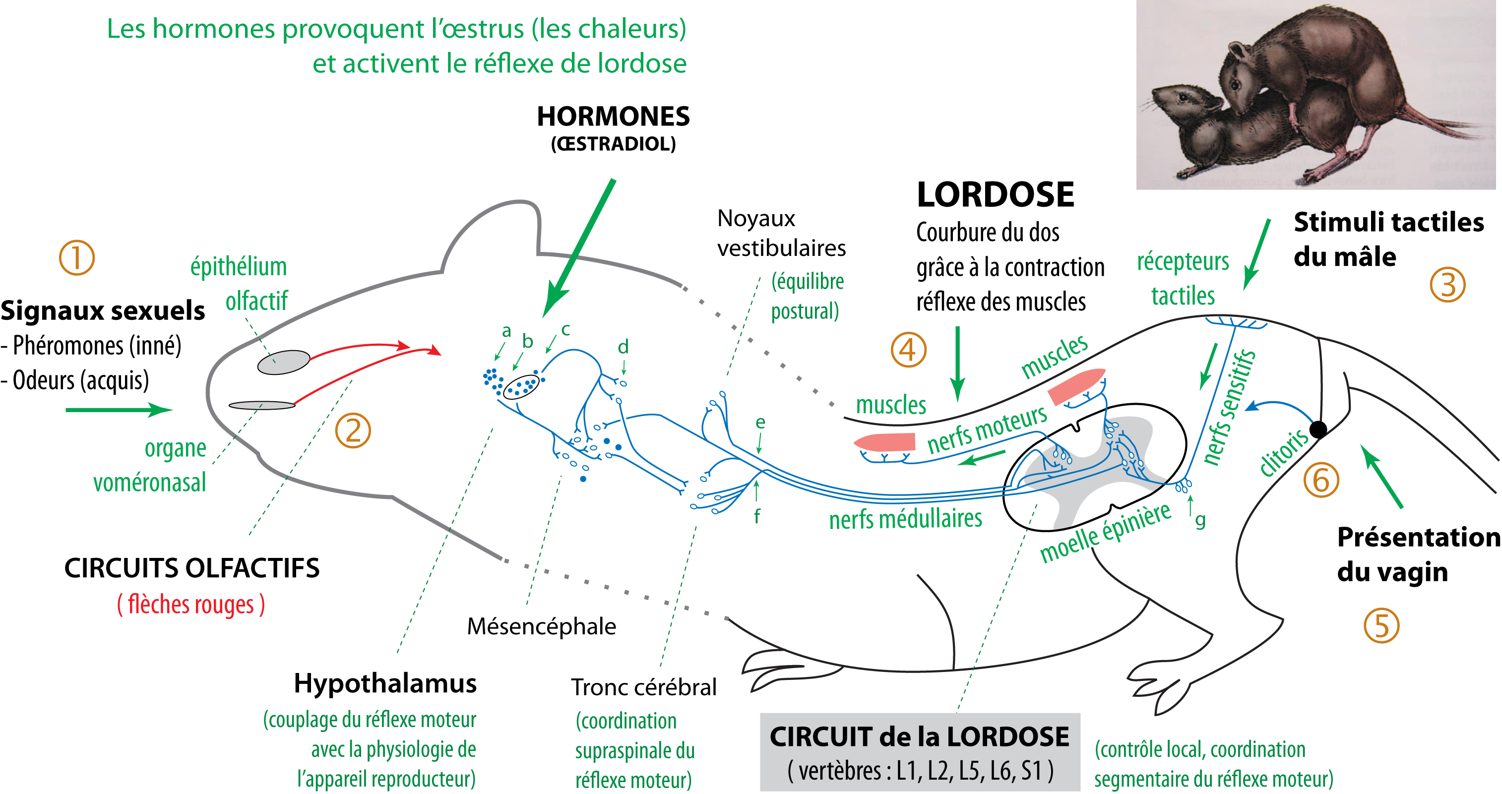 Schéma simplifié des circuits neurobiologiques du réflexe sexuel de lordose, spécifique aux mammifères femelles, et indispensable à la réalisation de la copulation. Ce réflexe sexuel moteur complexe est précablé dans la moelle épinière et reçoit des afférences modulatrices du télencéphale. Légende : a) Noyau préoptique médian ; b) Noyau hypothalamique antérieur ; c) Noyau hypothalamique ventromédian ; d) Formation réticulaire mésencéphalique ; e) Faisceau vestibulo-spinal ; f) Faisceau réticulo-spinal ; g) Racines dorsales L1, L2, L5, L6 et S1. NB: le circuit neural est bilatéral. Le schéma est simplifié pour plus de lisibilité. Schéma adapté d'après : Kow L.M., Florea C., Schwanzel-Fukuda M., Devidze N., Kami K.H., Lee A., Zhou J., Maclaughlin D., Donahoe P., Pfaff D. Development of a sexually differentiated behavior [lordosis] and its underlying CNS arousal functions. Curr. Top. Dev. Biol., 79:37-59, 2007 ; et Knobil E., Neill J.D. (Eds). The physiology of reproduction. Academic Press, 3nd edition, 2005